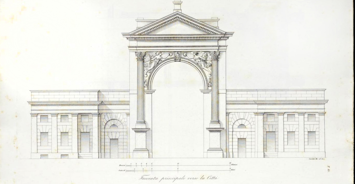 Ferdinando Cassina, Porta Nuova, facciata principale verso la città (1840), , in Le fabbriche più cospicue di Milano, 1840.